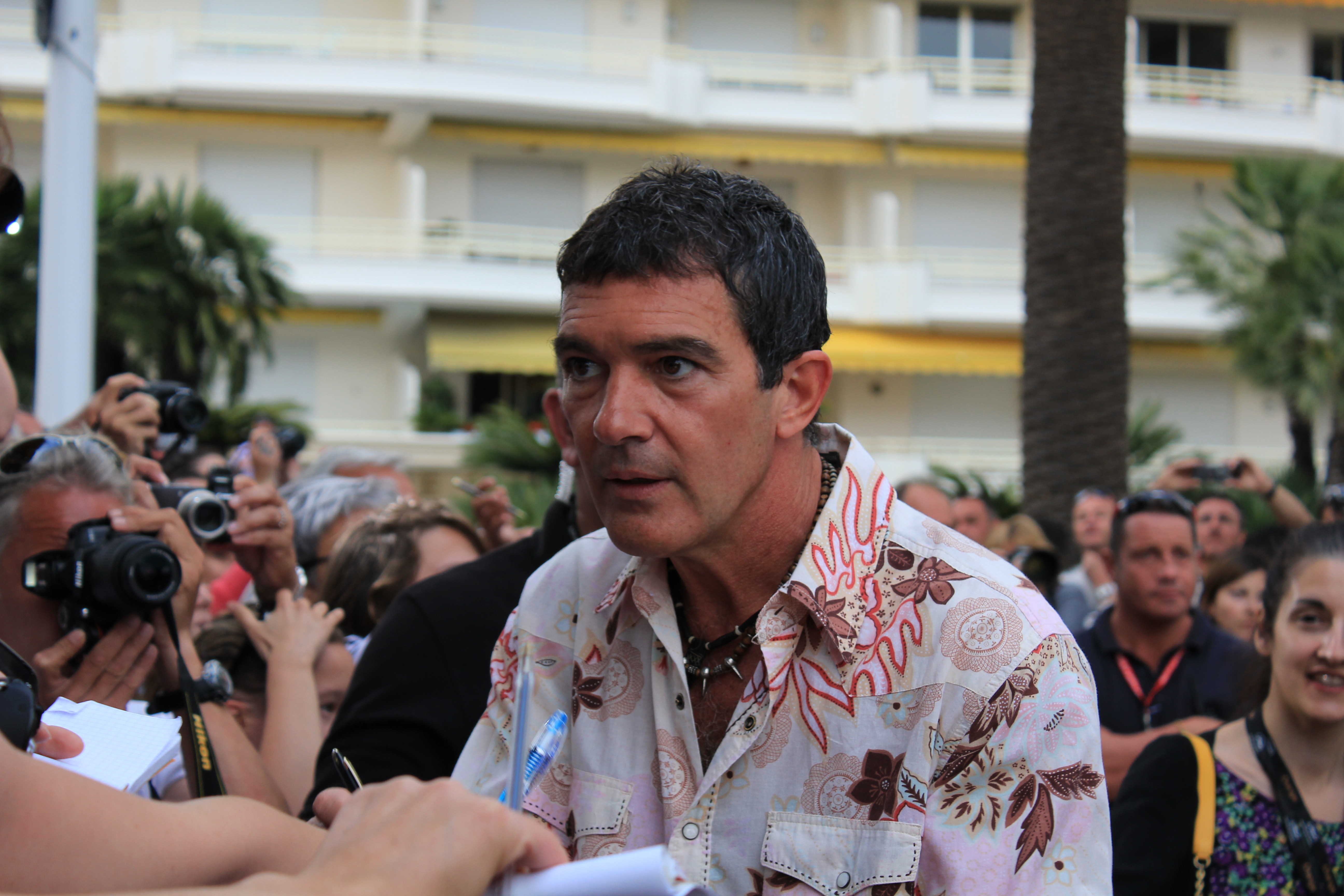 Festival de Cannes 2011